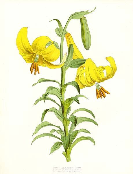 Lilium monadelphum Chromolitographie von Sir Joseph Paxton aus dem Jahre 1880